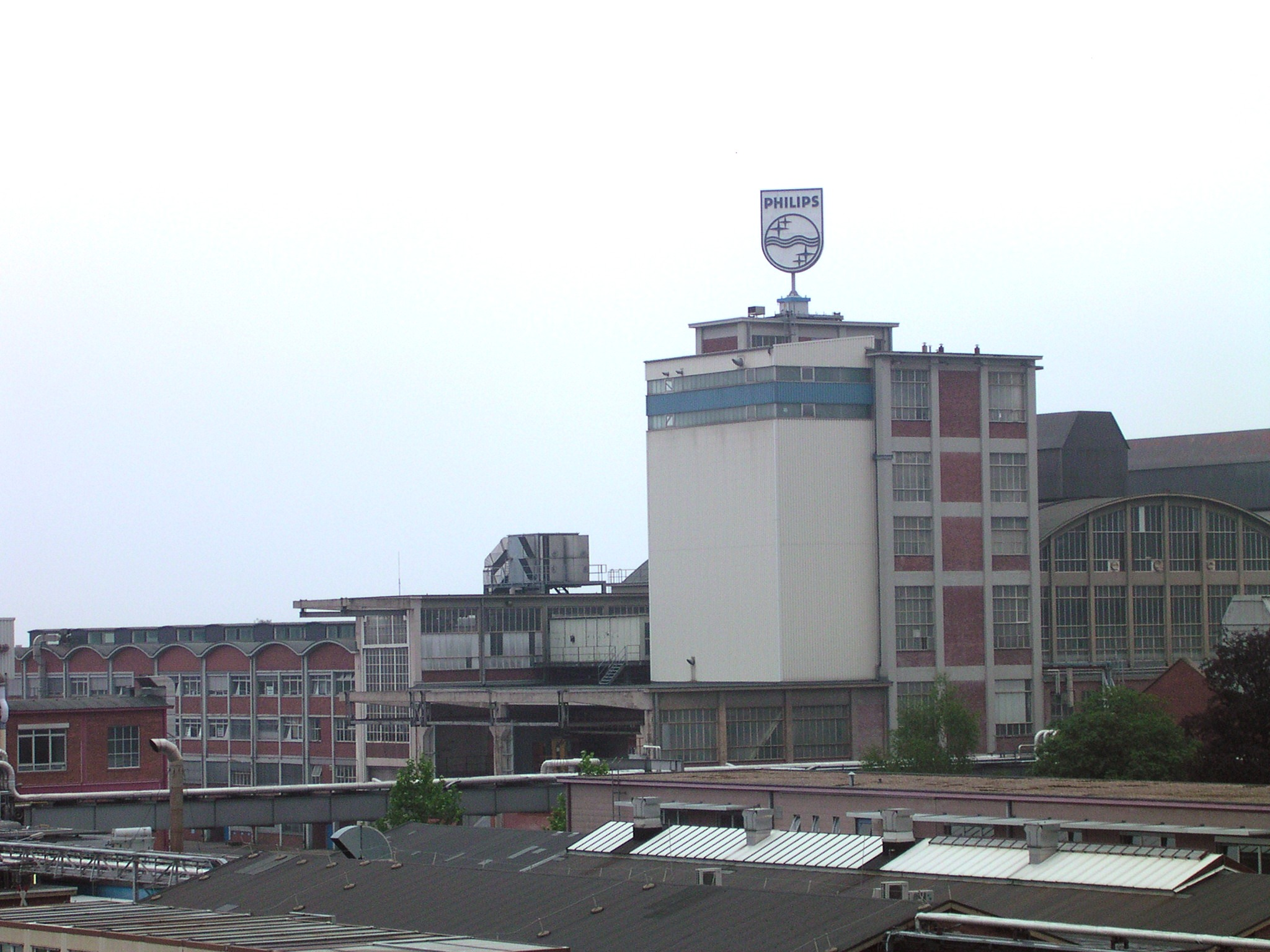 Aachen, Philips-Glasfabrik, zuletzt LG.Philips